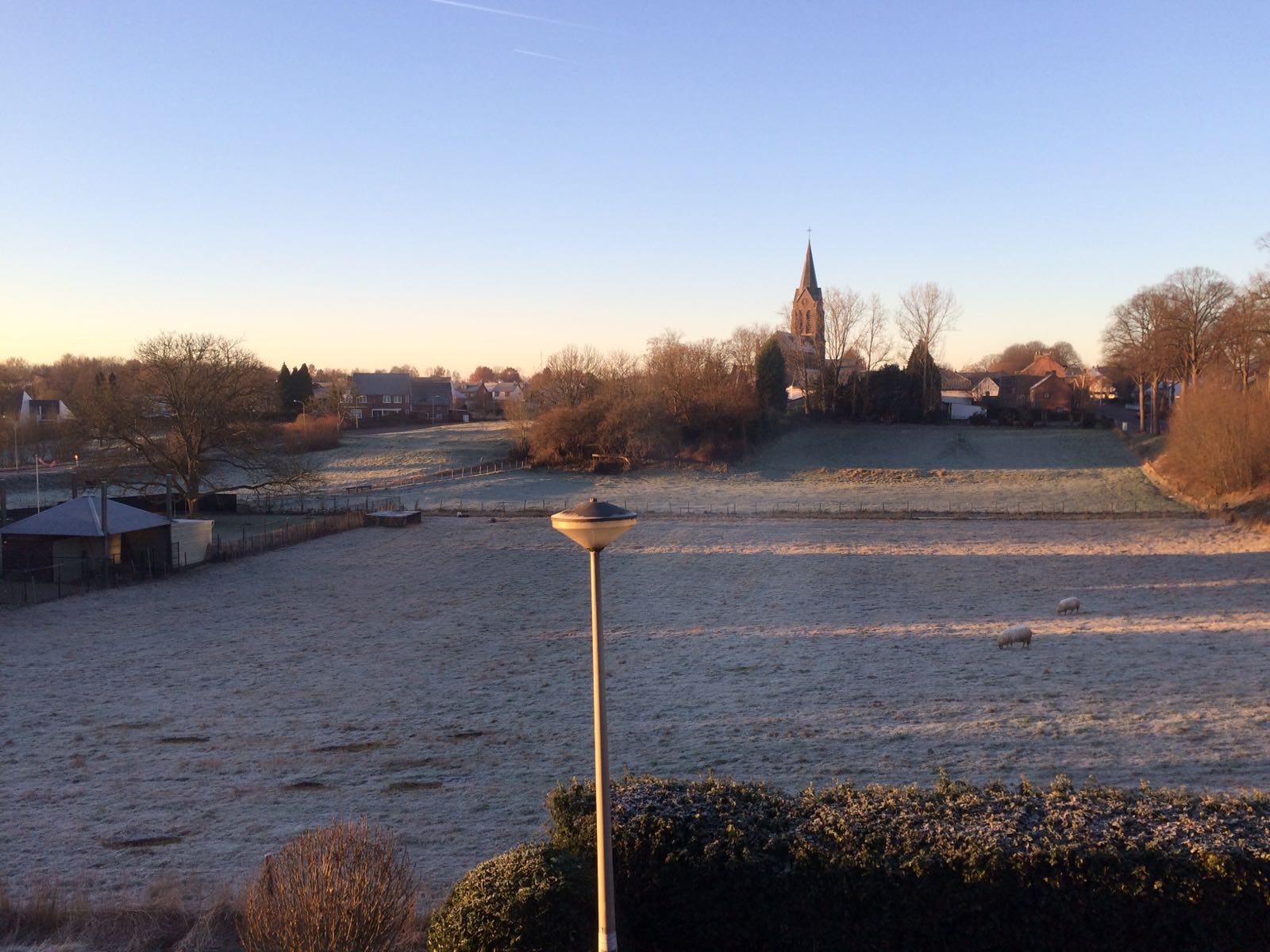 uitzicht op de Kleine Zouw, ter hoogte van de Tongerseweg.